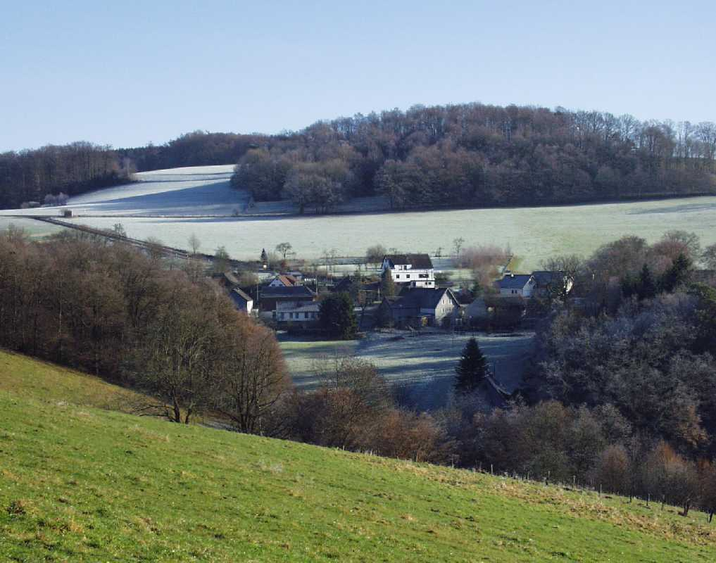 Heikausen, Ortsteil von Reichshof, fotografiert von Nordwesten